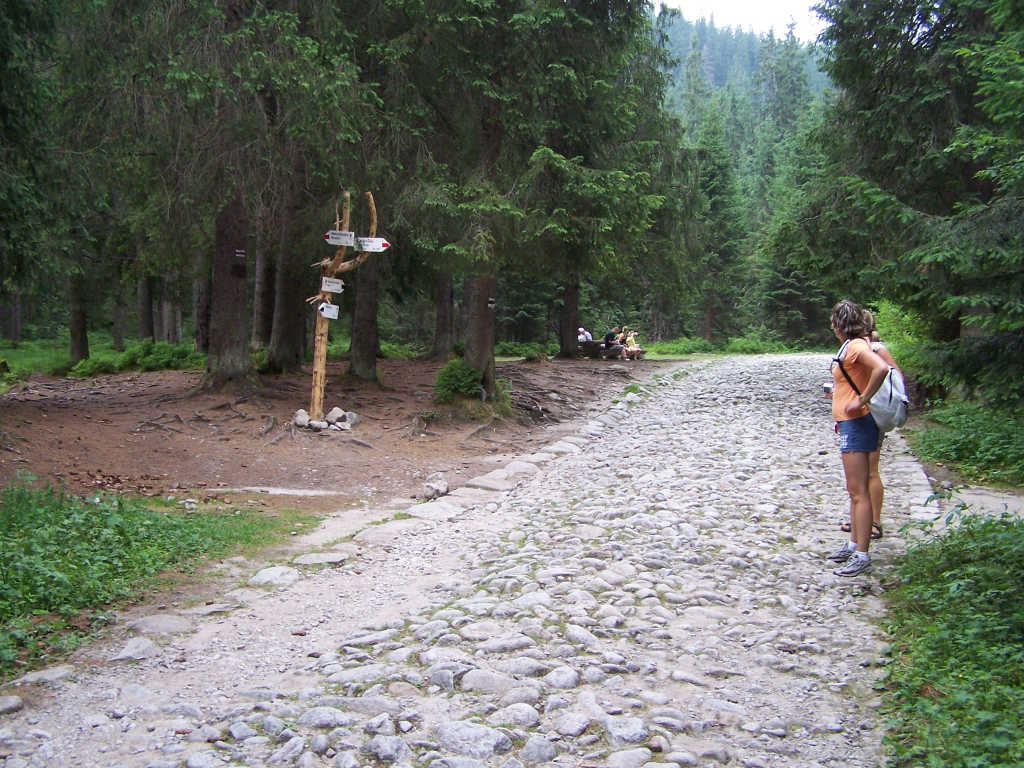 Psia Trawka(Tatra Mountains)